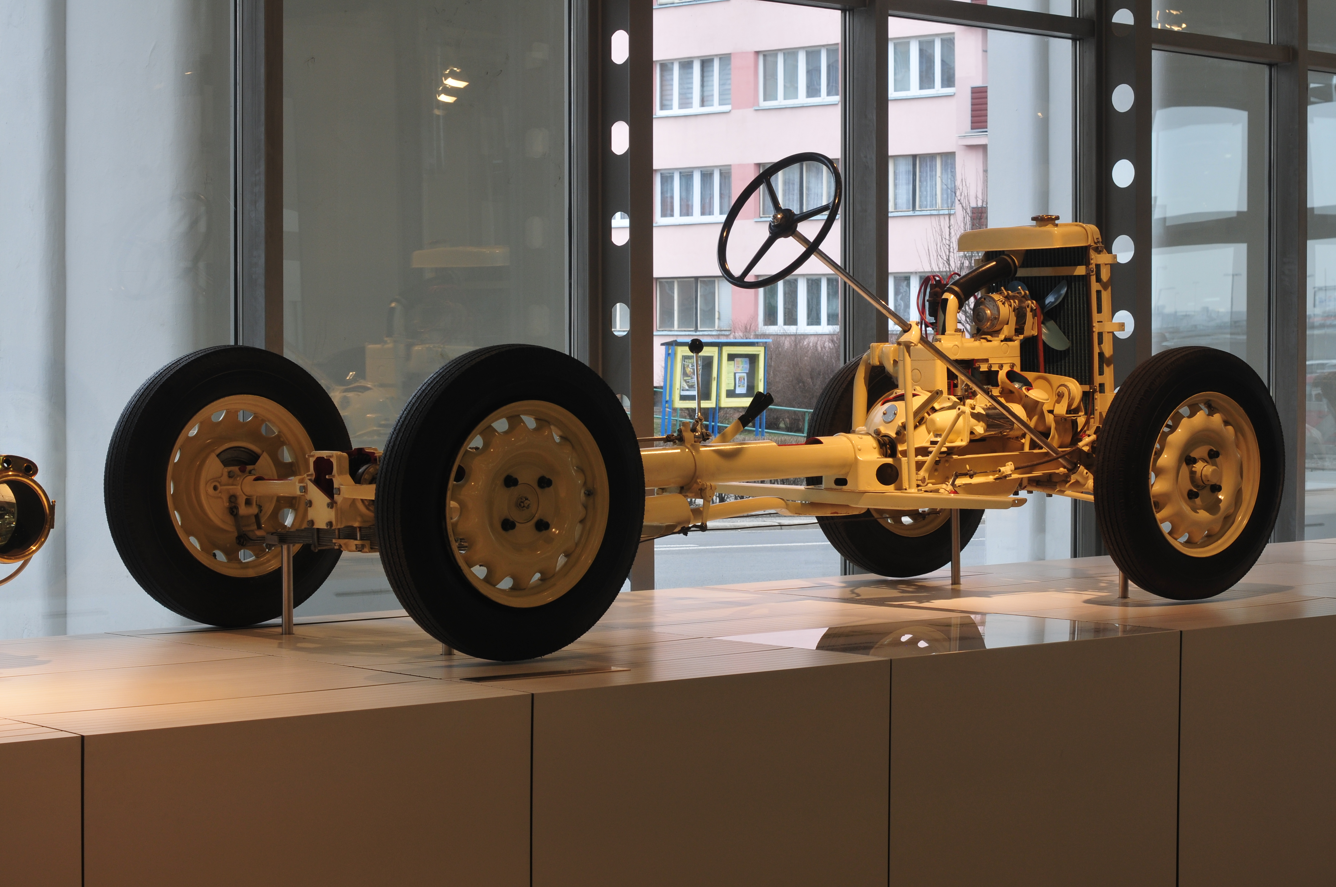 Fototermin Škoda Museum Mladá Boleslav 2013 Fototermin Škoda Muzeum 5. April 2013 in Mladá Boleslav This work is free and may be used by anyone for any purpose. If you wish to use this content, you do not need to request permission as long as you follow any licensing requirements mentioned on this page.